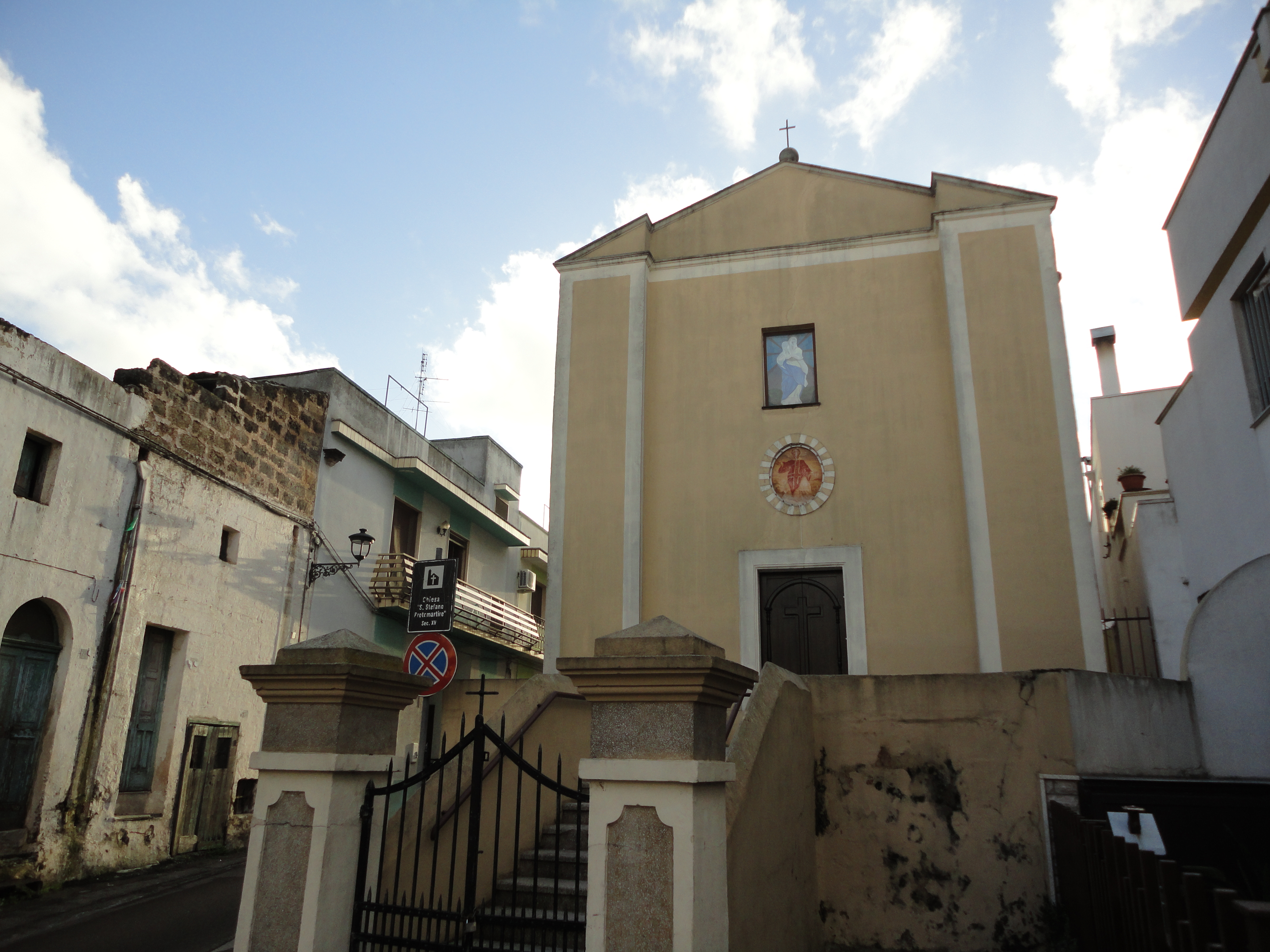 Chiesa di Santo Stefano Taurisano, Lecce